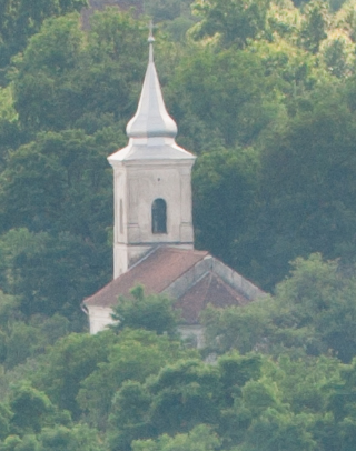 Satul Șona vazut de la movile